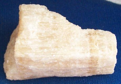 gips alabaster, pochodzenie Włochy, autor zdjęcia Sebastian Socha 11.10. 2006 r.